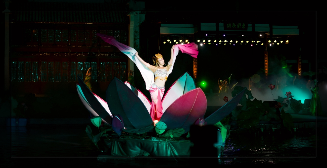 2010-7-24,极度深寒拍摄于白鹭洲公园，夜泊秦淮演出片段